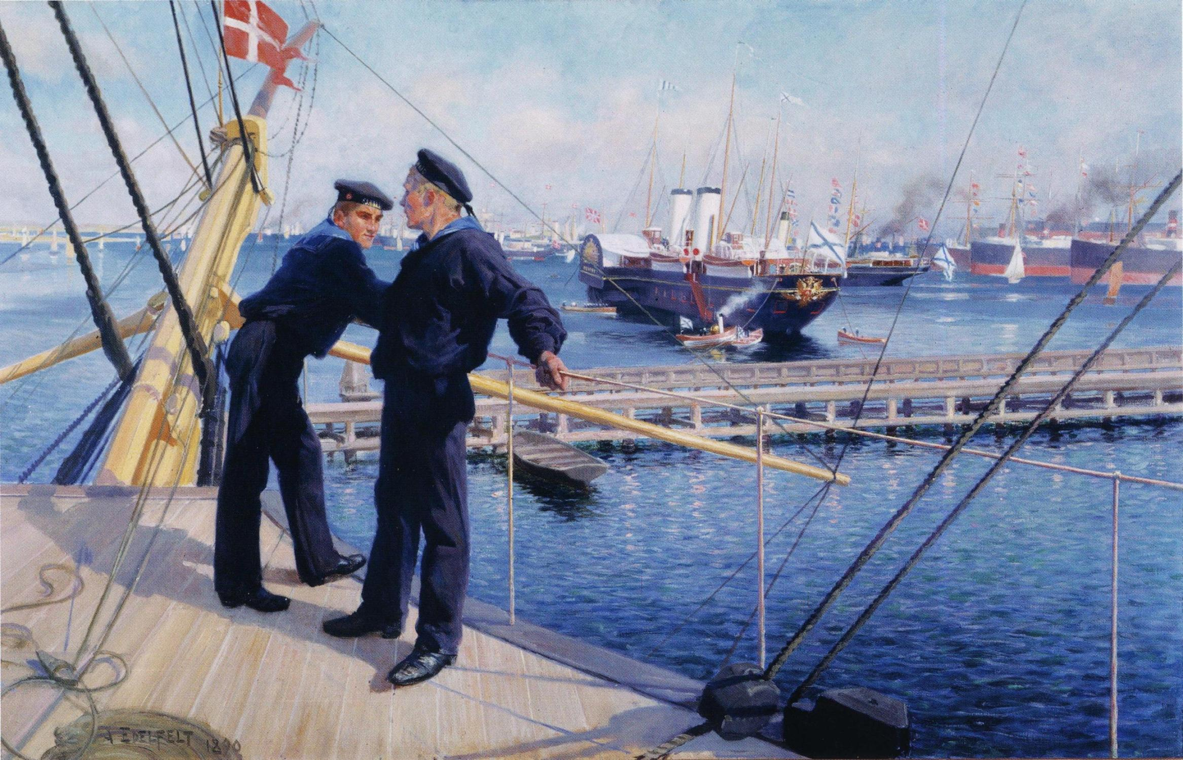 Yksi kolmesta Kööpenhaminan satamaa esittävästä maalauksesta, jotka Albert Edelfelt teki vuonna 1890 Venäjän keisari Aleksanteri III:n ja tämän tanskalaissyntyisen vaimon keisarinna Maria Fjodorovnan tilauksesta. Kaksi muuta ovat Kööpenhaminan ankkuripaikalta I ja Kööpenhaminan ankkuripaikalta II. Näkymä on maalattu tanskalaisen fregatti Sjællandin kannelta, taustalla näkyy Venäjän keisarillinen huvialus Deržava ja muita venäläisiä aluksia. Maalaus on valmistumisestaan alkaen sijainnut Helsingin keisarillisessa palatsissa (nyk. Presidentinlinna).